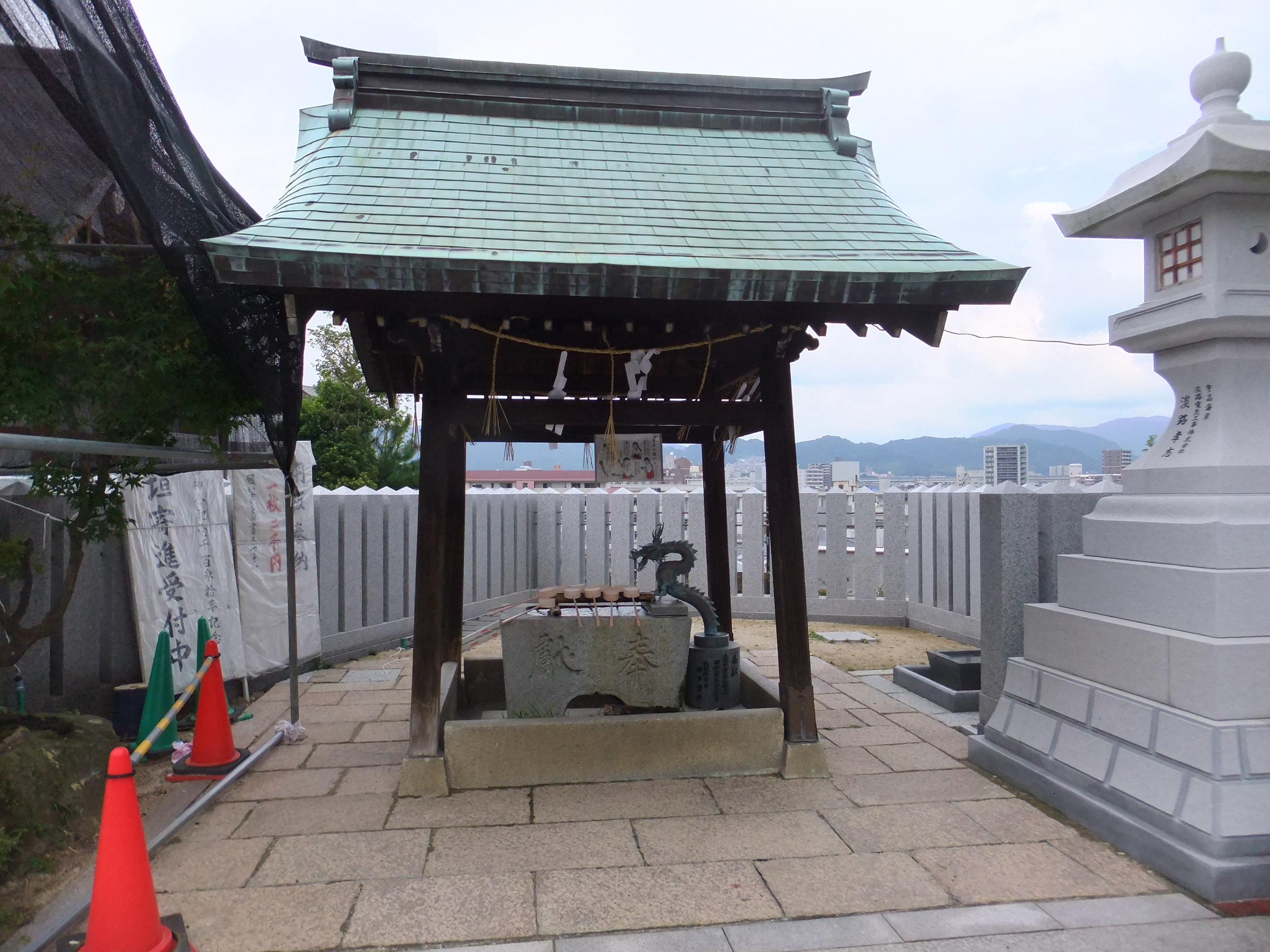 邇保姫神社